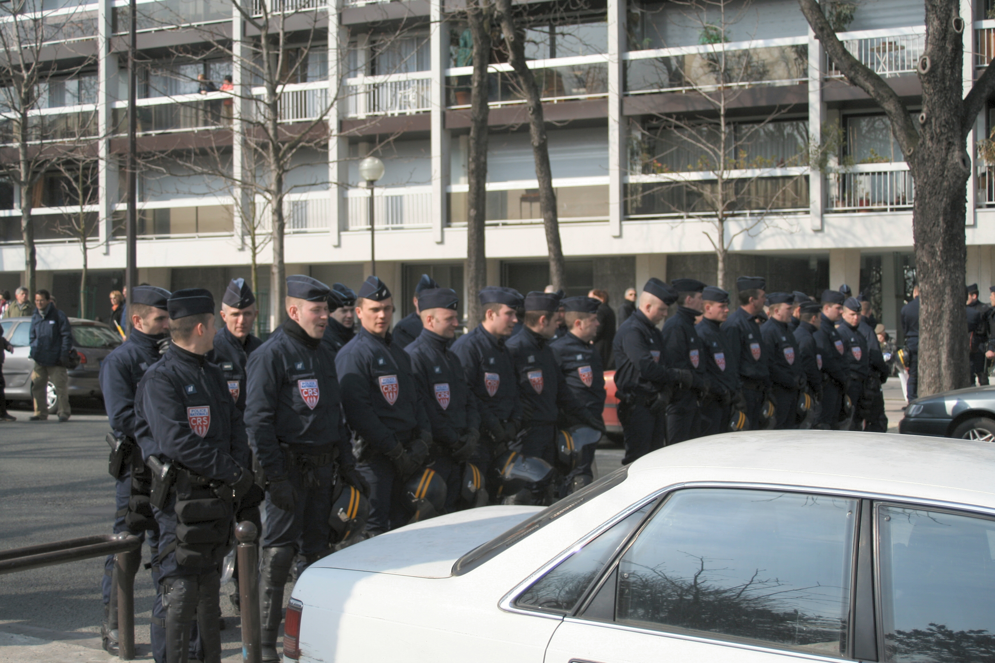 Manifestation anti-CPE à Paris le 18/03/2006 entre la place Denfert-Rochereau et la place de la Nation.